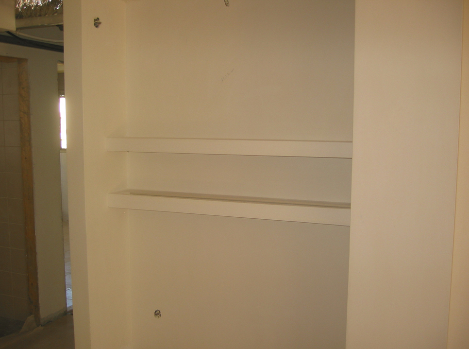 קירות גבס שבנייתם כמעט גמורה וביניהם מין נישה עם מדפי גבס. נראים מבחוץ לאחר הטיוח כעשויים מקשה אחת.